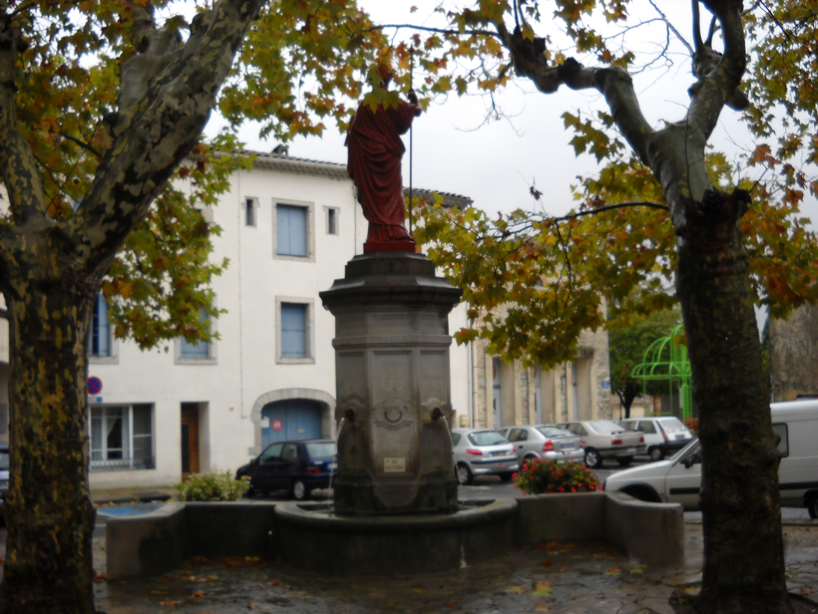 La fontaine ou "griffe" sur la place de l'Hermet